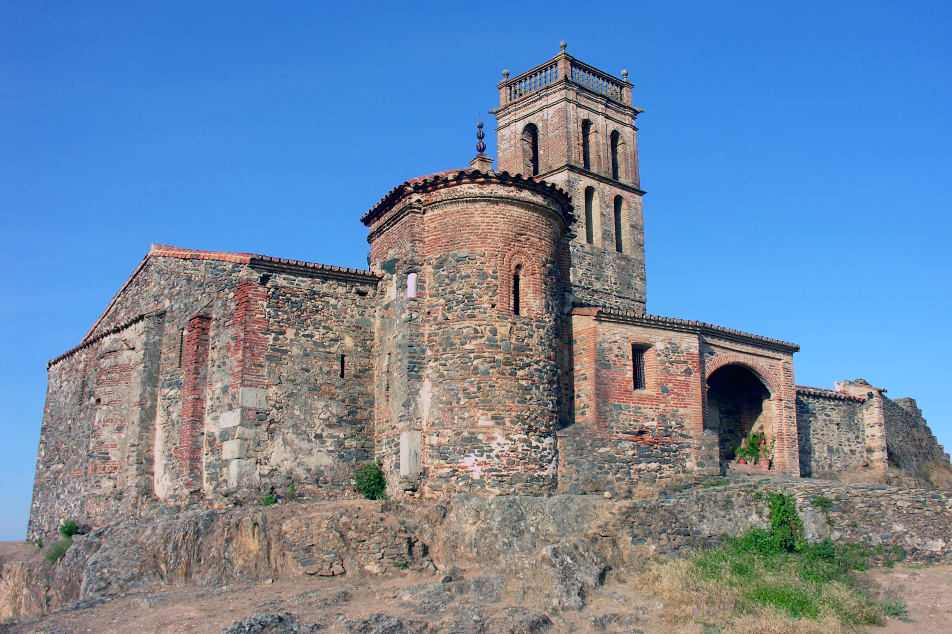 Vue intérieure de la Mosquée d'Almonaster la Real